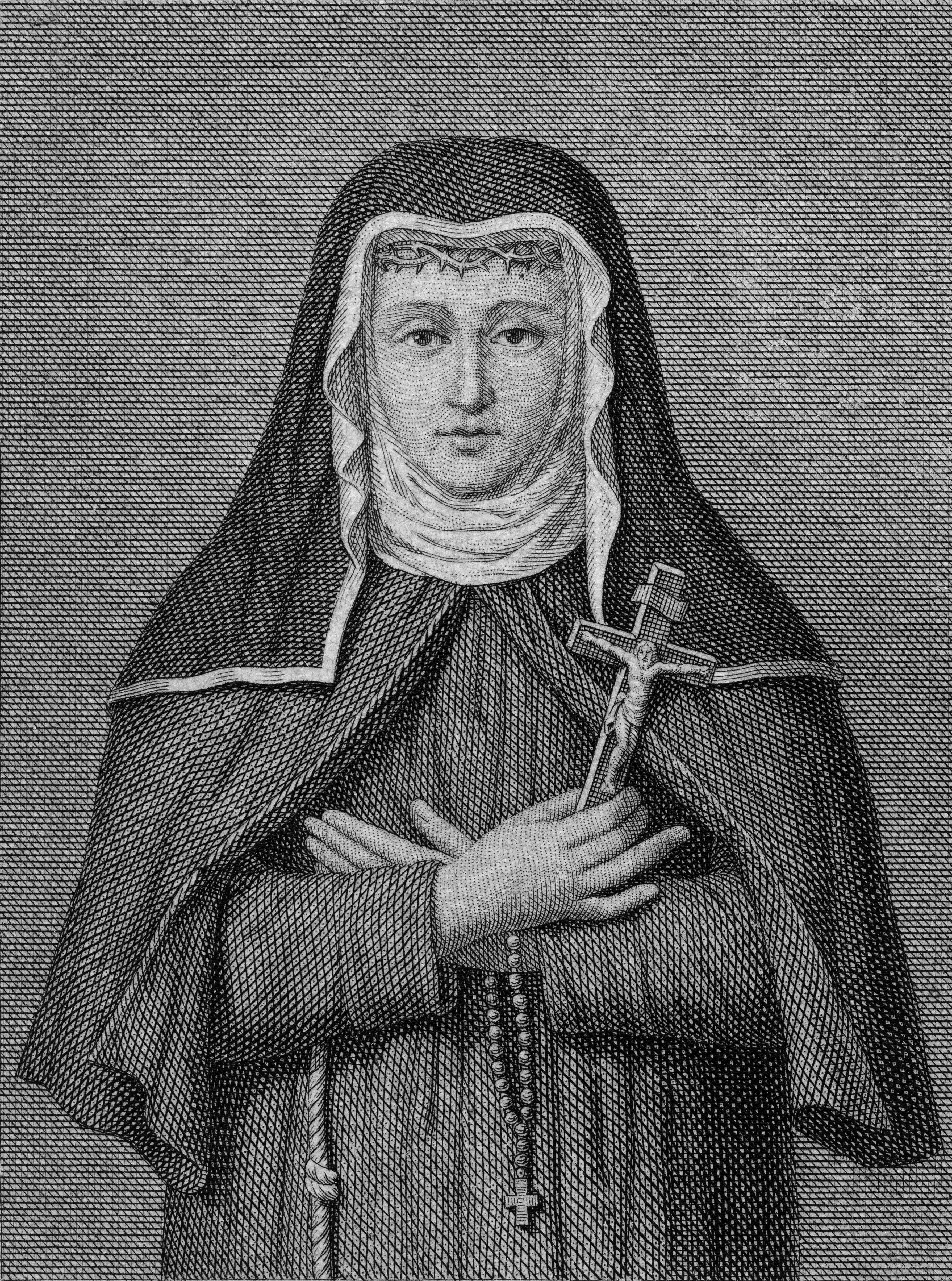 Portrait de Soeur Maria-Diomira, 1708-1768, par P. Projaing et publiée pour la première fois en 1788 et une seconde fois en 1916.